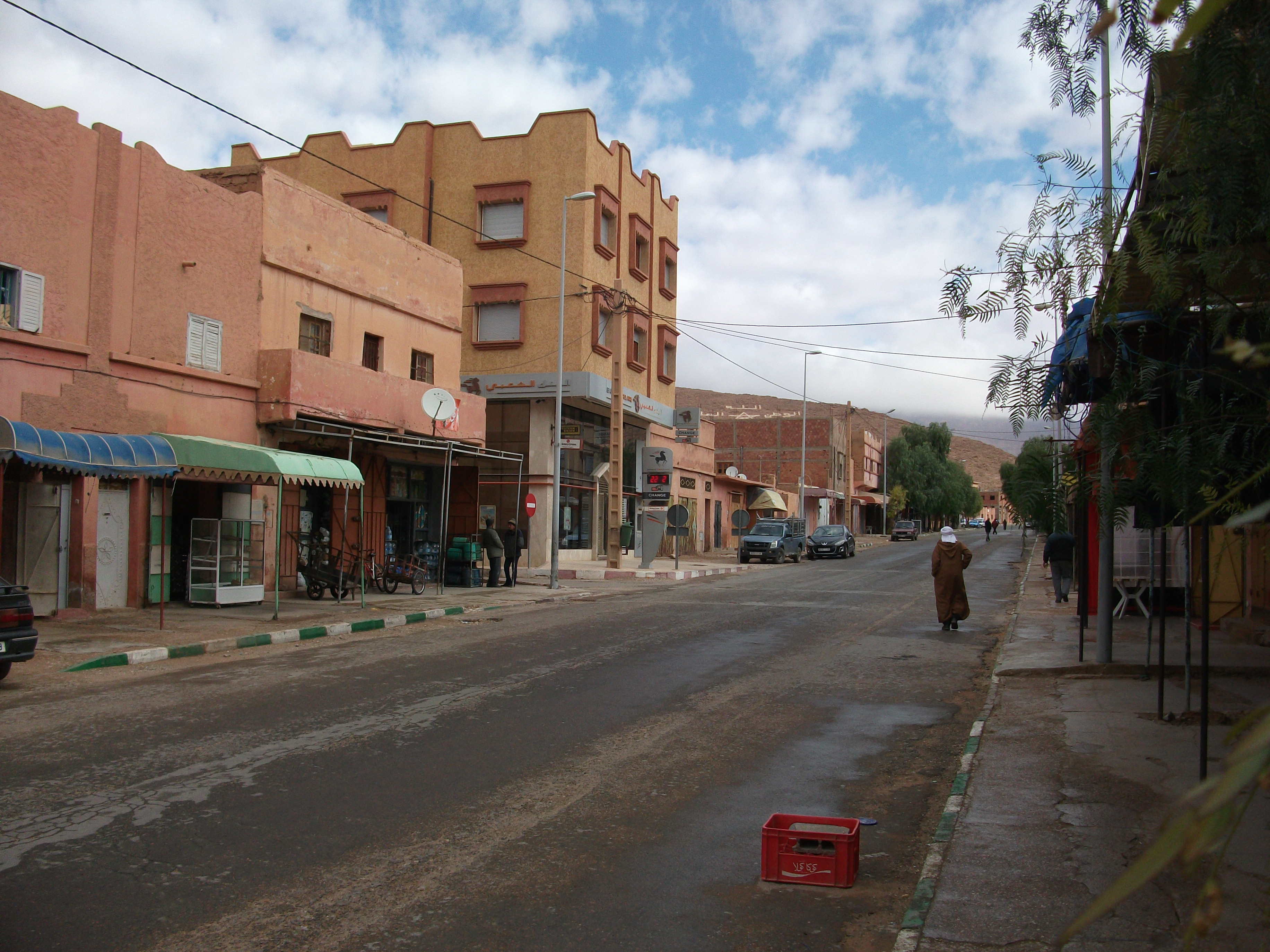 Bouarfa, Straße